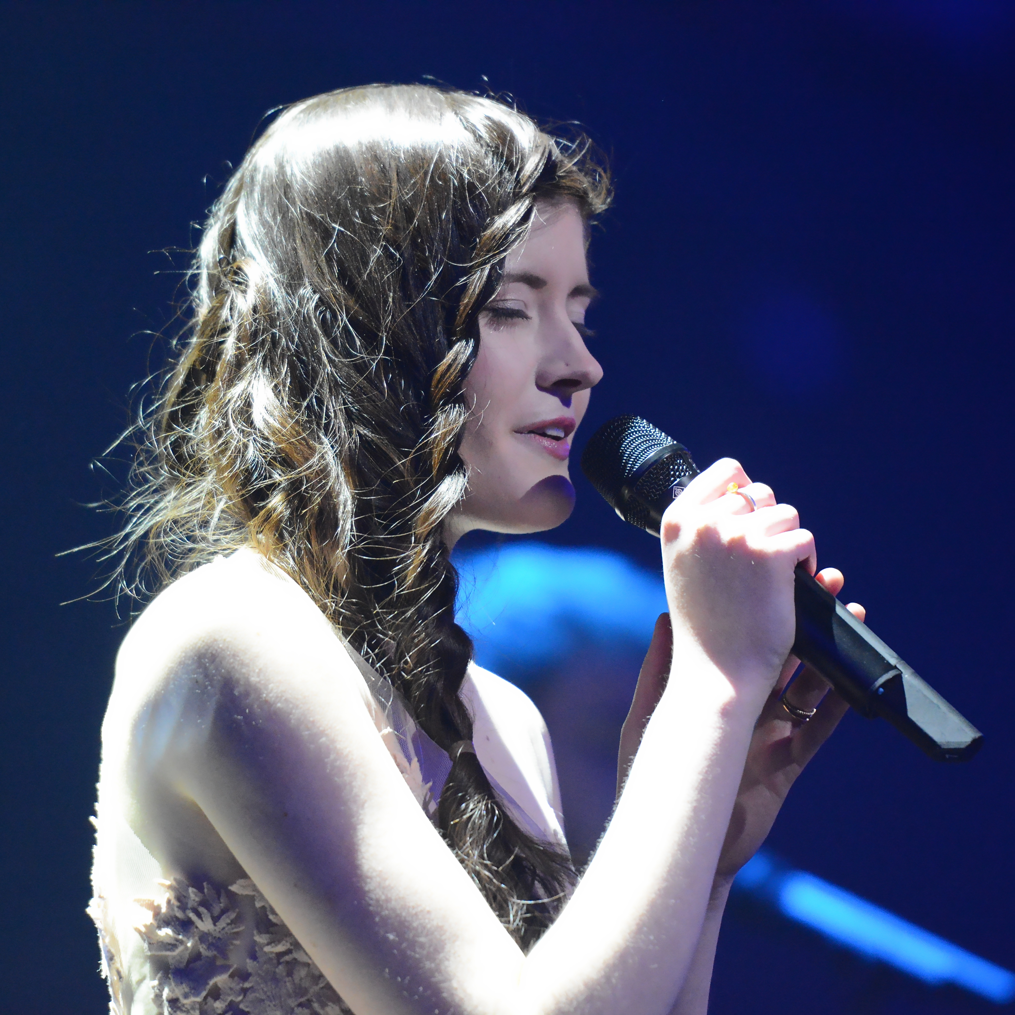 Madeline Juno bei Unser Song für Dänemark 2014 in Köln.